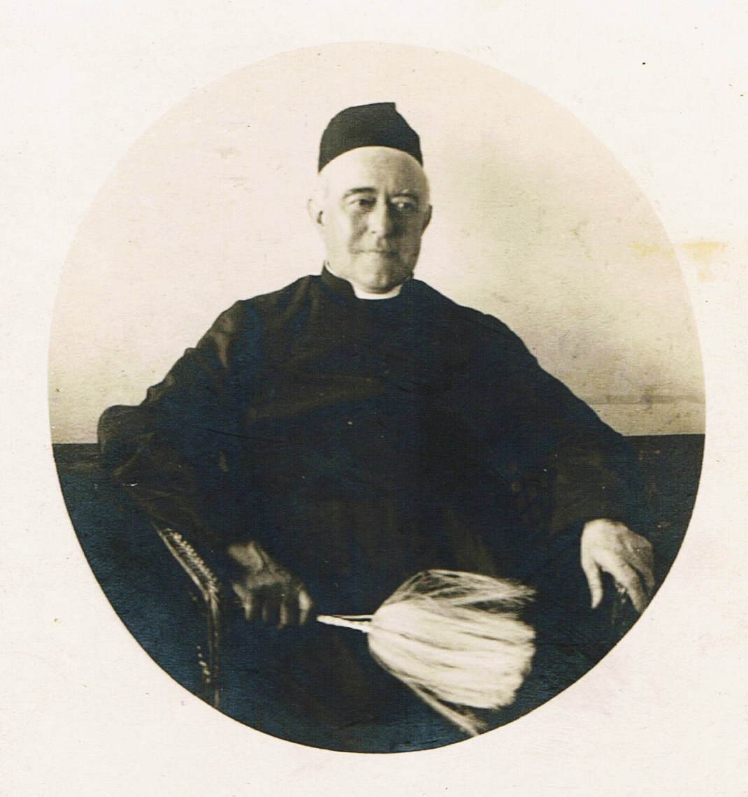 Le chanoine et historien Louis Duchesne ((1843-1922) au Caire, Egypte, en 1912. Il est alors directeur de l'Institut Français d'Archéologie Orientale du Caire.